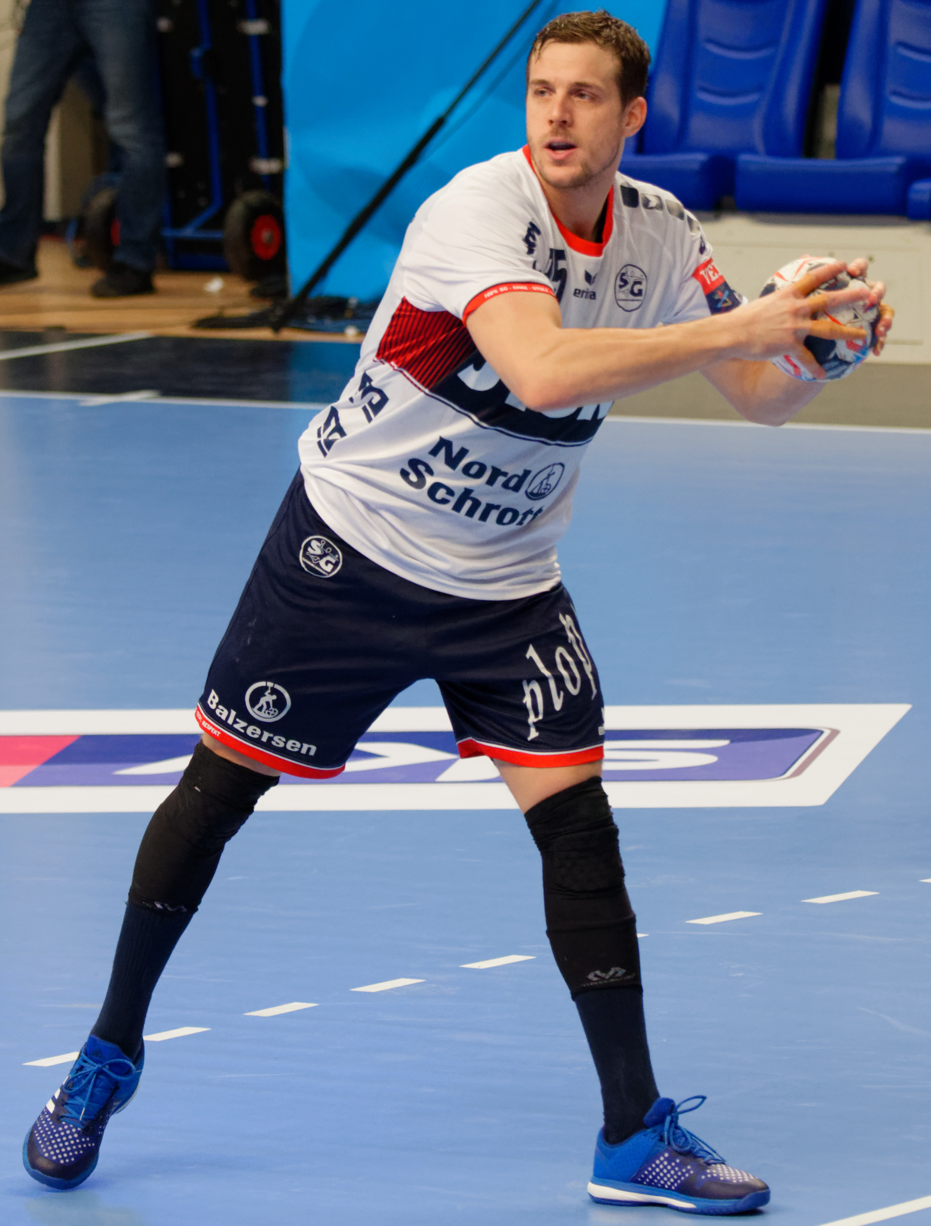 Rencontre de phase de groupe de la ligue des champions 2017/18 entre le PSG et SG Flensburg. A Coubertin, le 17 février 2018.